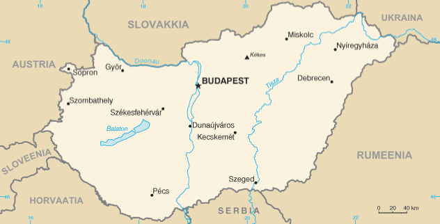 Ungari kaart